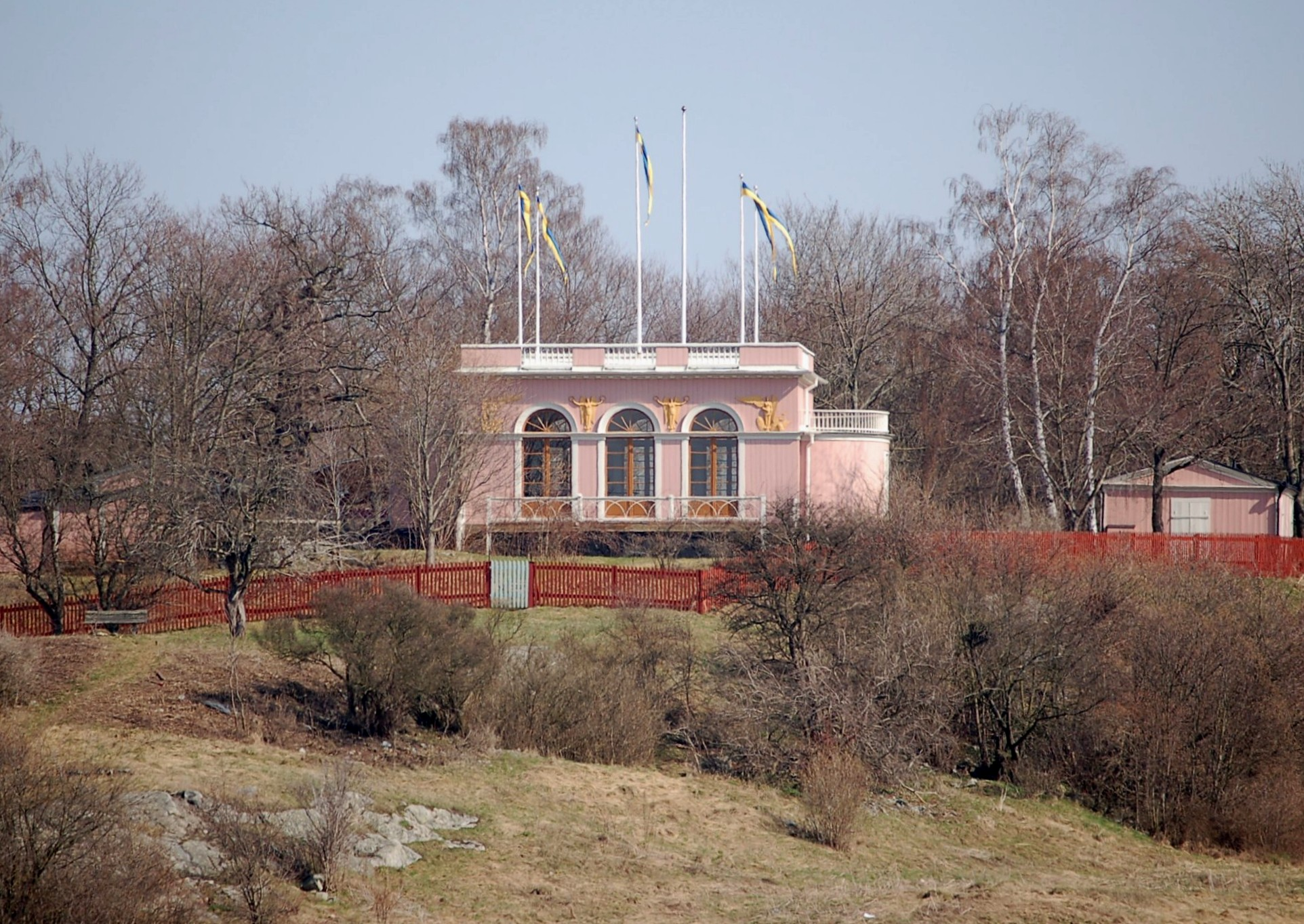 Borgen, Stockholm sedd mot öster 25 april 2006